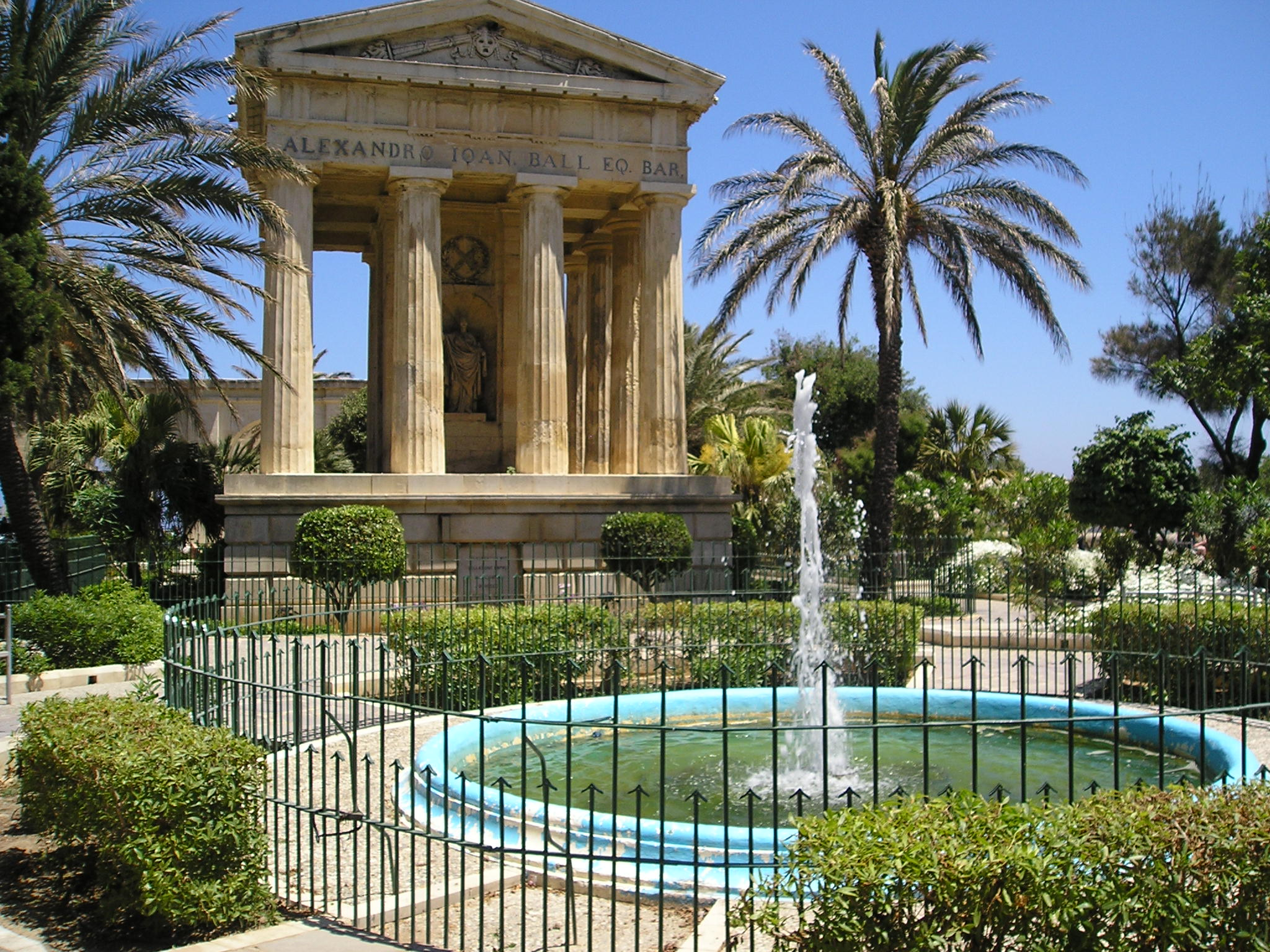 Lower Barracca Gardens, Valletta, Malta